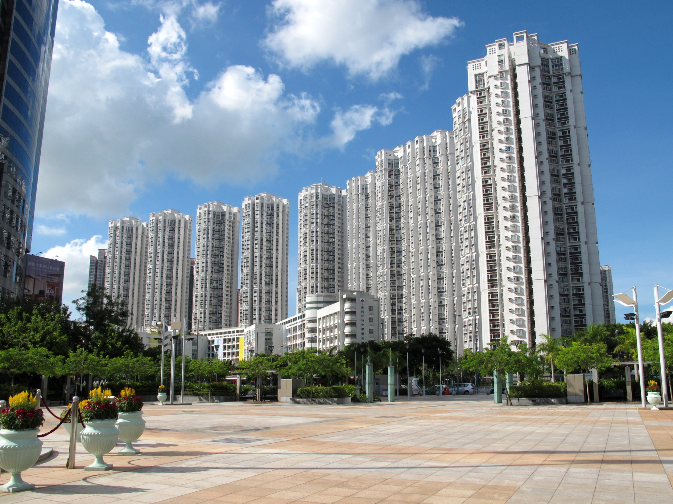 Lynwood Court 麗湖居